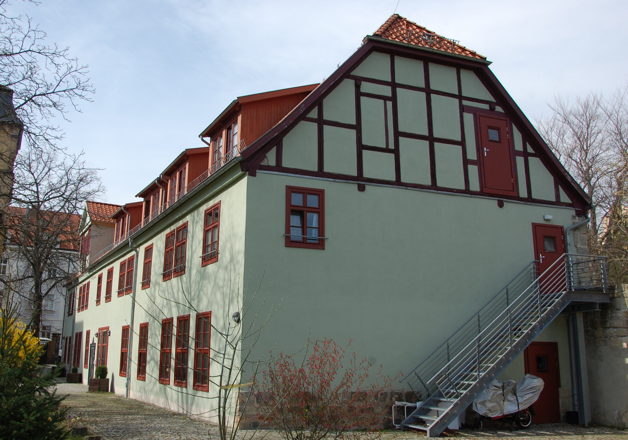 Haus Mummental 1a in Quedlinburg